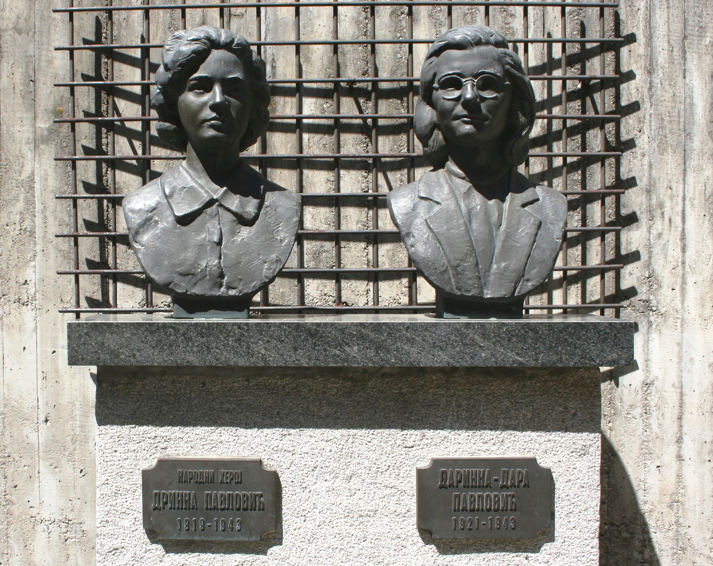 Споменик сестрама Дринки и Даринки Павловић у Белановици